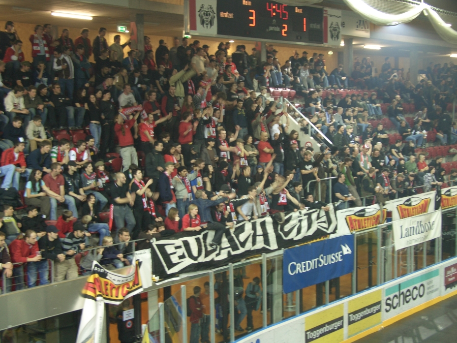 Hallenmasters 2007 - Winterthur- und St. Pauli-Fans